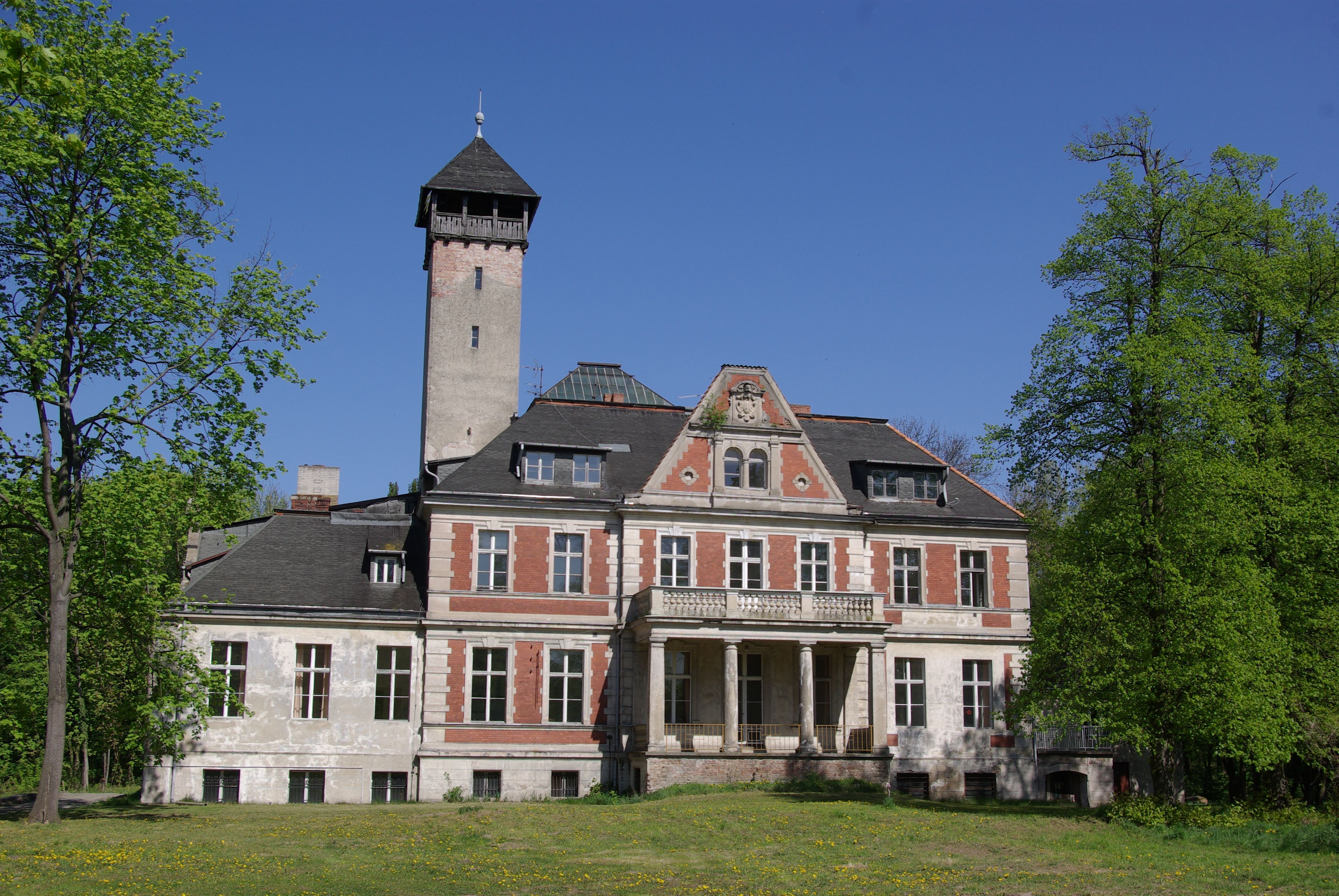 Schulzendorf in Brandenburg. Das ehemalige Schloss steht unter Denkmalschutz.